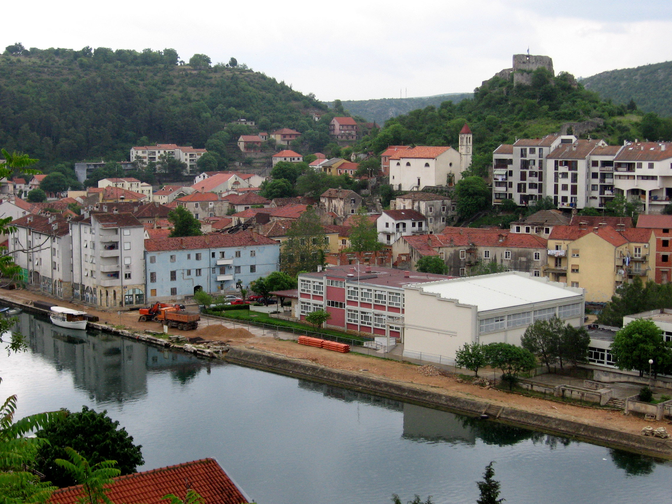 Obrovac (Kroatien))